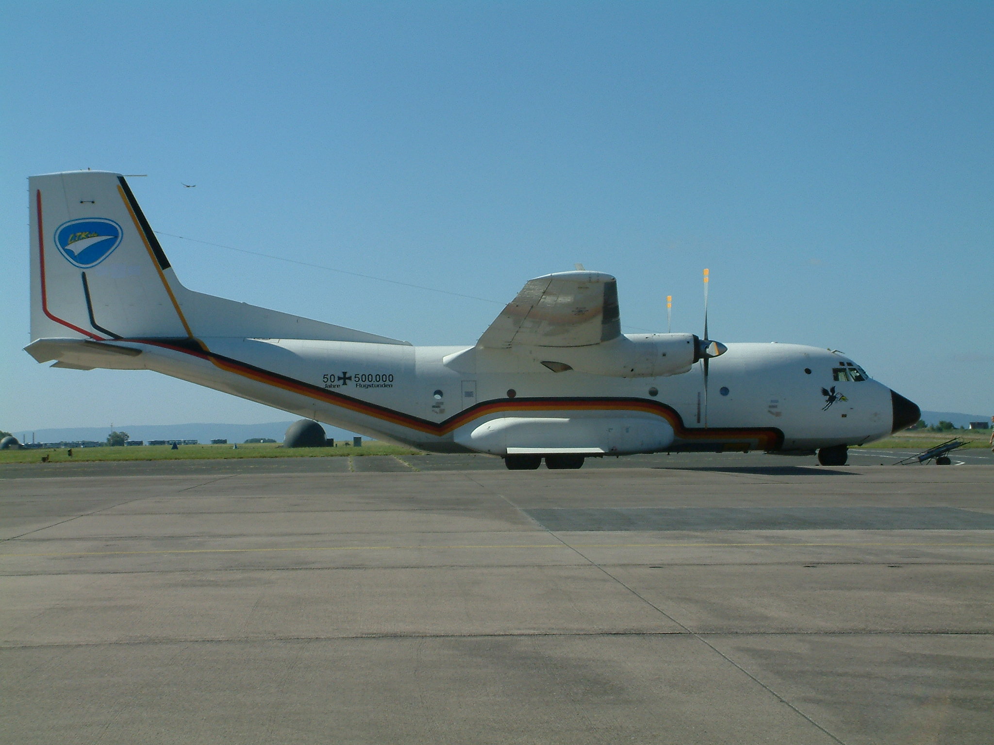 Transall C-160 in Sonderlackierung mit Sonderkennzeichen am Flugtag in Wunstorf (ETNW)